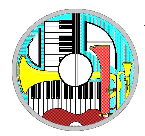 Logo van de Vrije Orgelclub Antwerpen FV, met daarin verwerkt de drie eerste letters van de benaming: V O A . Eigen werk (Own work)